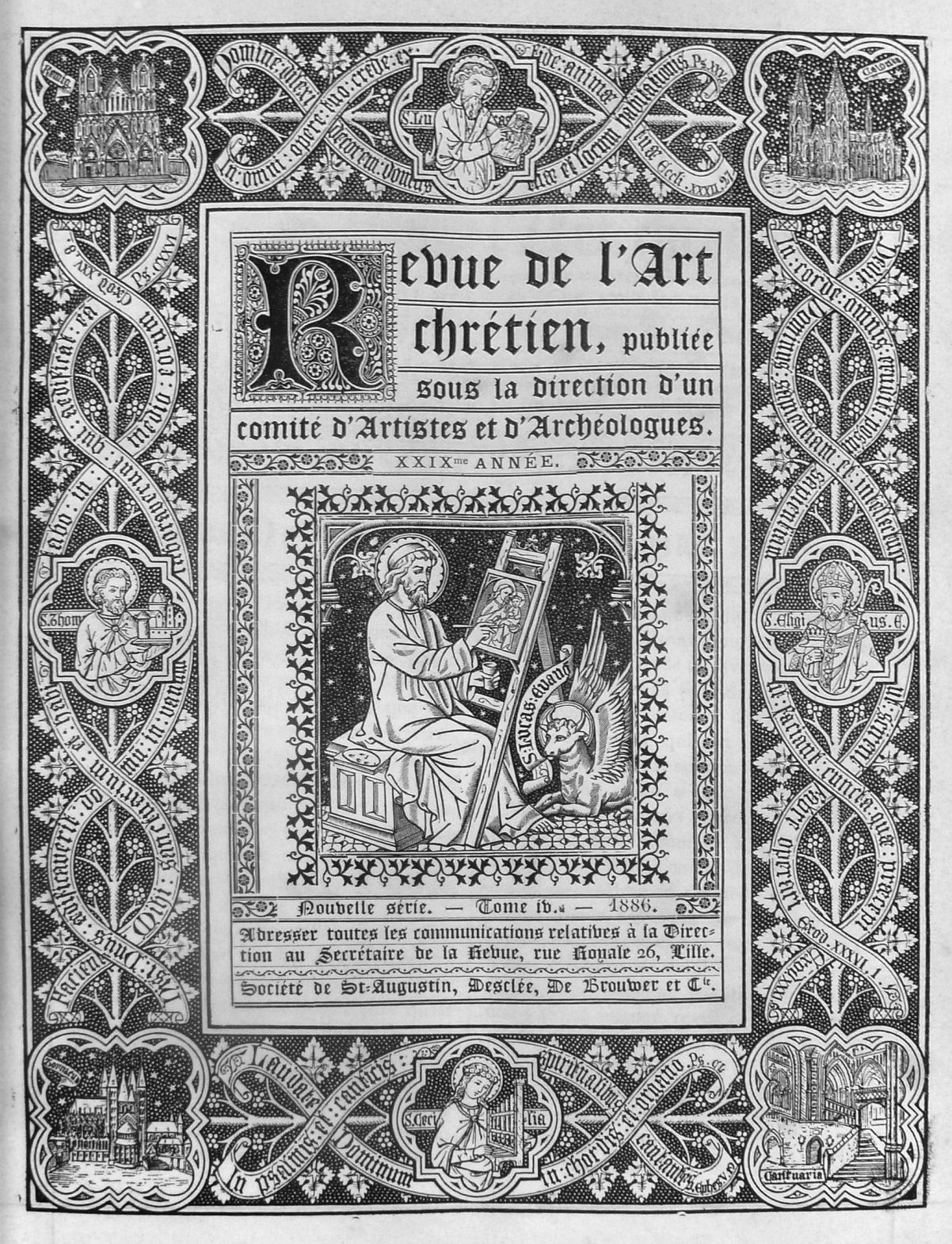 Revue de l'art chretien 1886/ Louis Cloquet